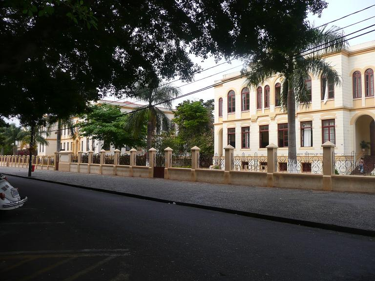 Aspecto da Avenida Peixoto Gomide, onde se pode avistar em primeiro plano a Escola Estadual "Professor Adherbal de Paula Ferreira, na sequencia a Escola Estadual "Peixoto Gomide" e ao fundo a Escola Estadual "Coronel Fernando Prestes, todos os prédios projetados pelo eminente arquiteto Ramos de Azevedo.